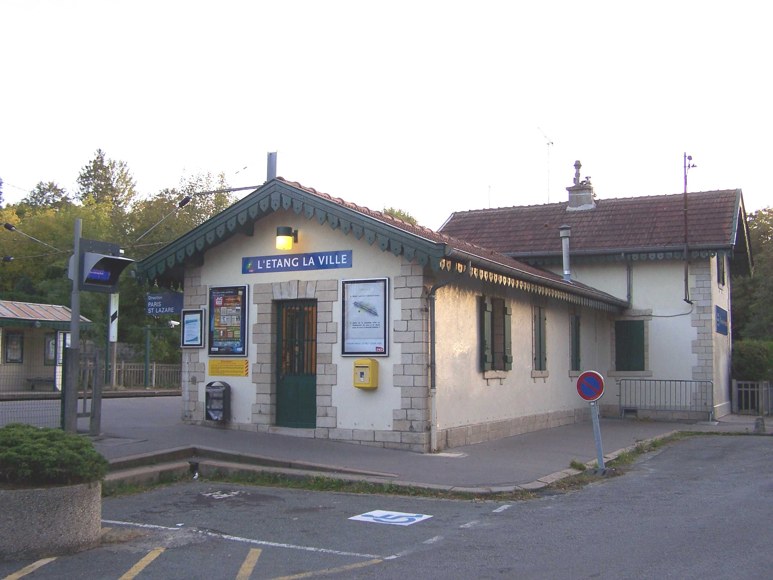 Gare de L'Étang-la-Ville (Yvelines, France)